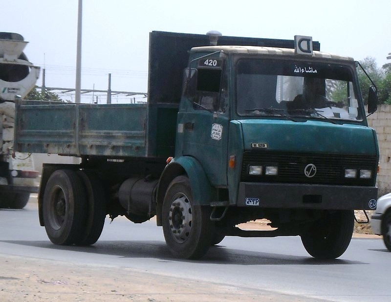 شاحنة سوناكوم ك120